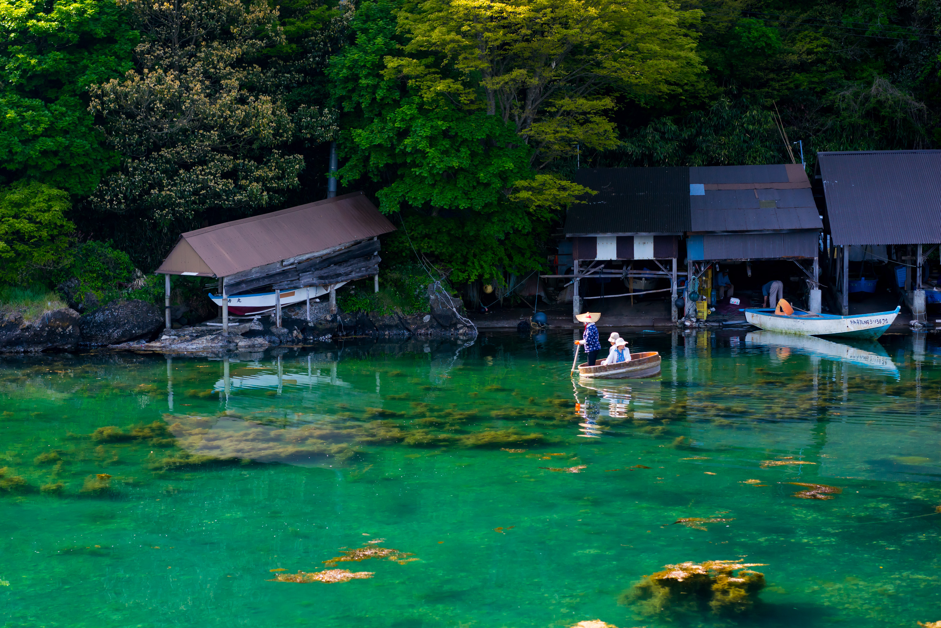 矢島経島たらい舟